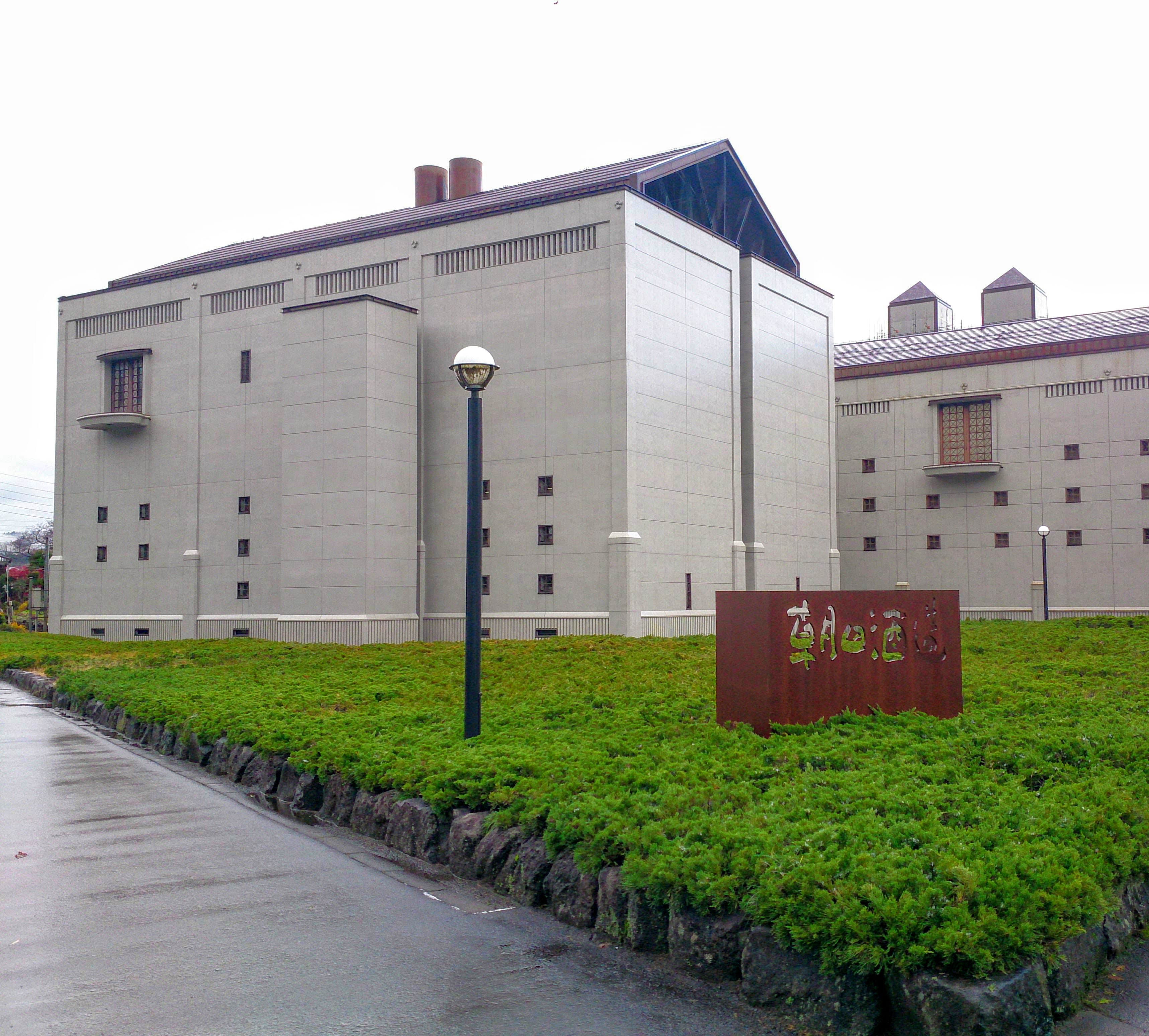 朝日酒造の建物